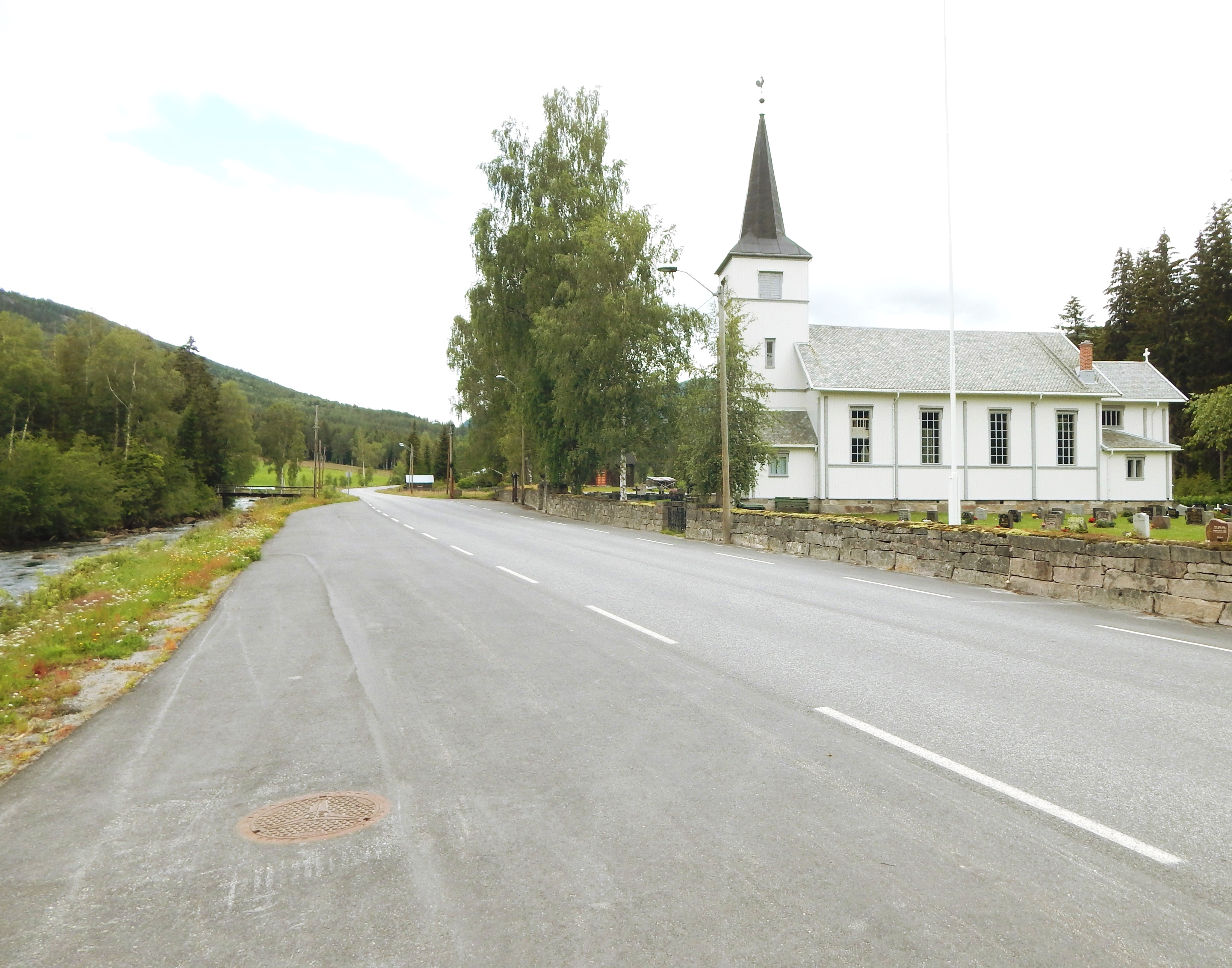 Fylkesvei 755 forbi Austbygde kirke